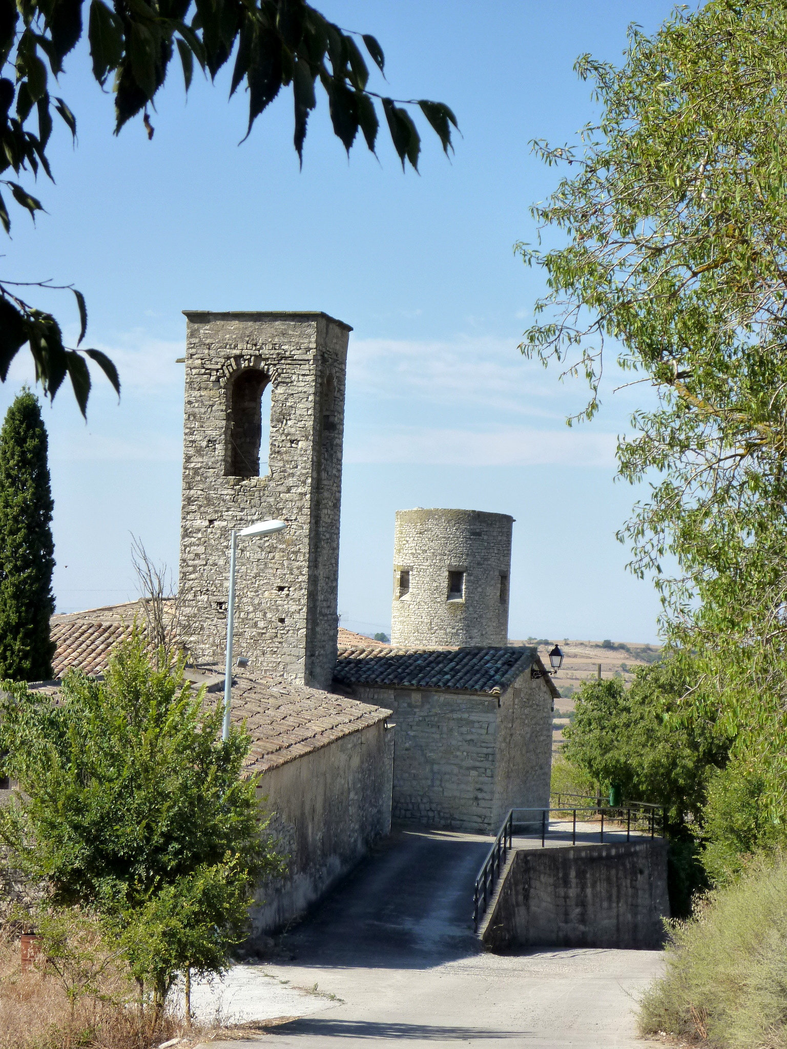 Església parroquial de Sant Martí (Sant Ramon): campanar i castell